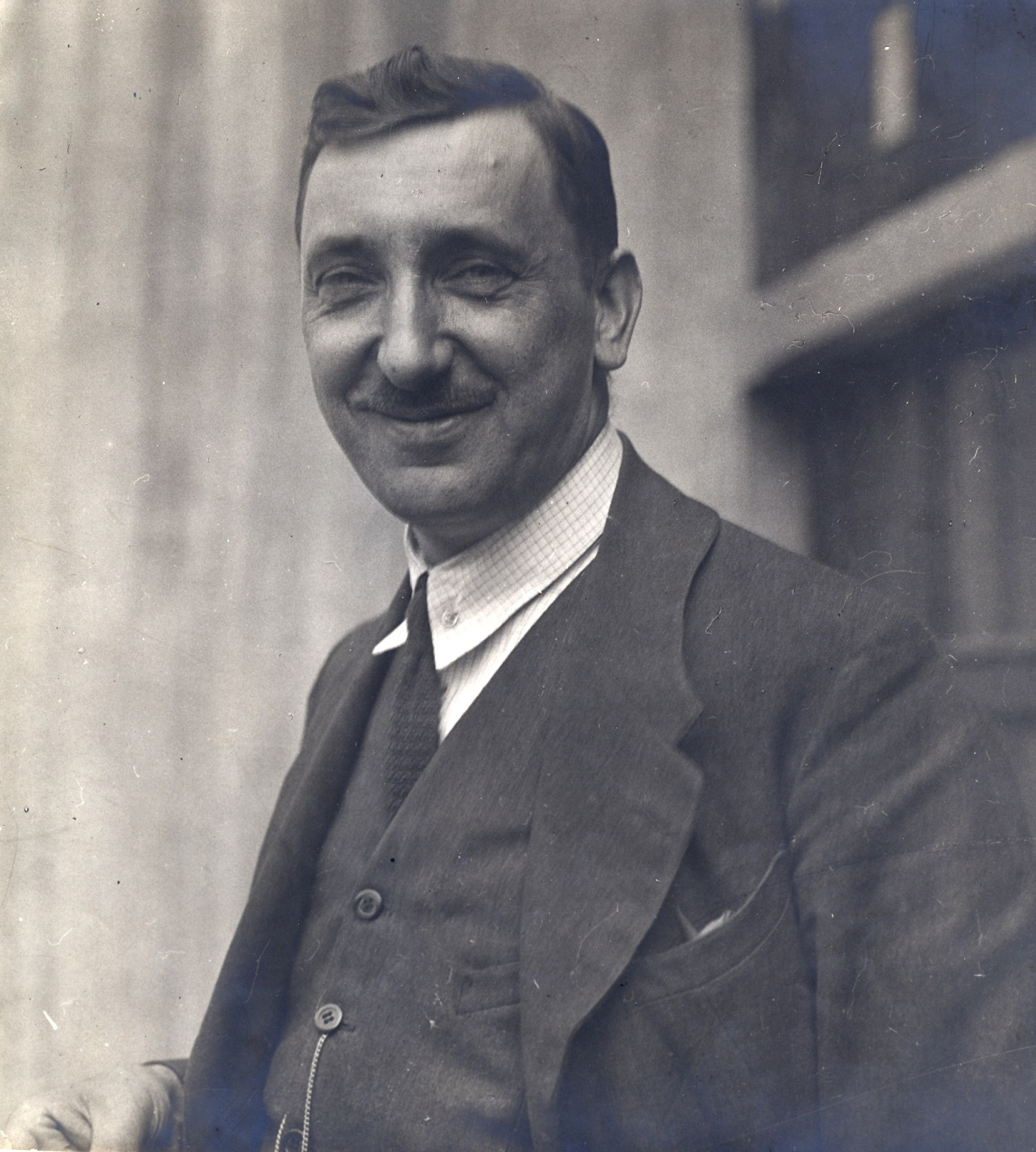 Jan Morávek (1888 - 1958), Český spisovatel.